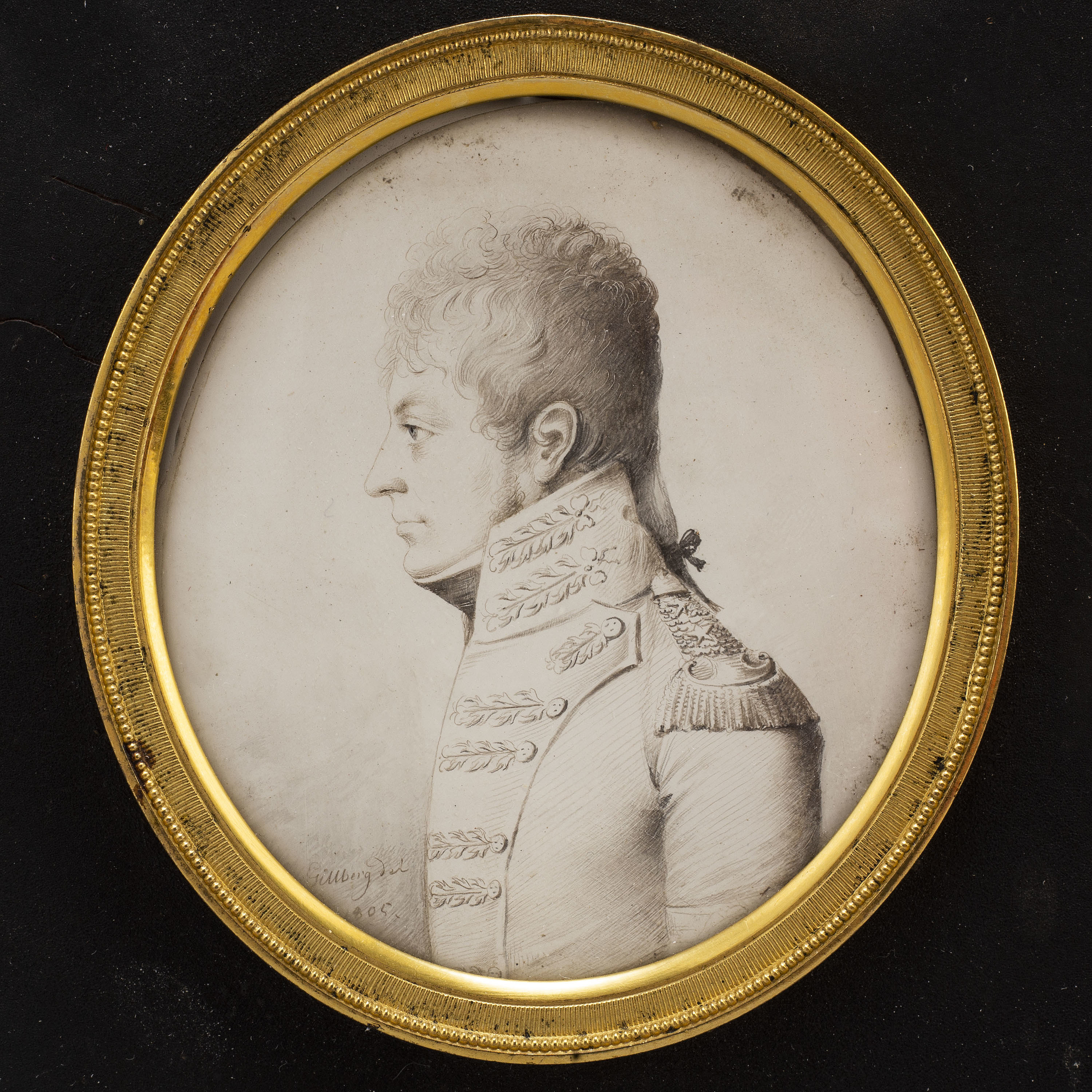 Porträtt av Nils Adolf Djurklou i uniform för en kapten vid Svea Livgarde, avporträtterad 1805 av Jacob Axel Gillberg.